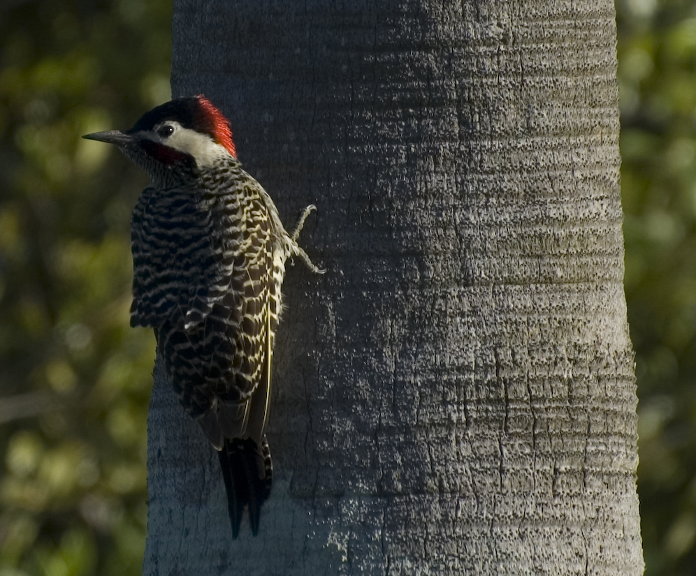 CARPINTERO NUCA ROJA Colaptes melanochloros